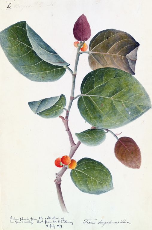 Banyan botanical